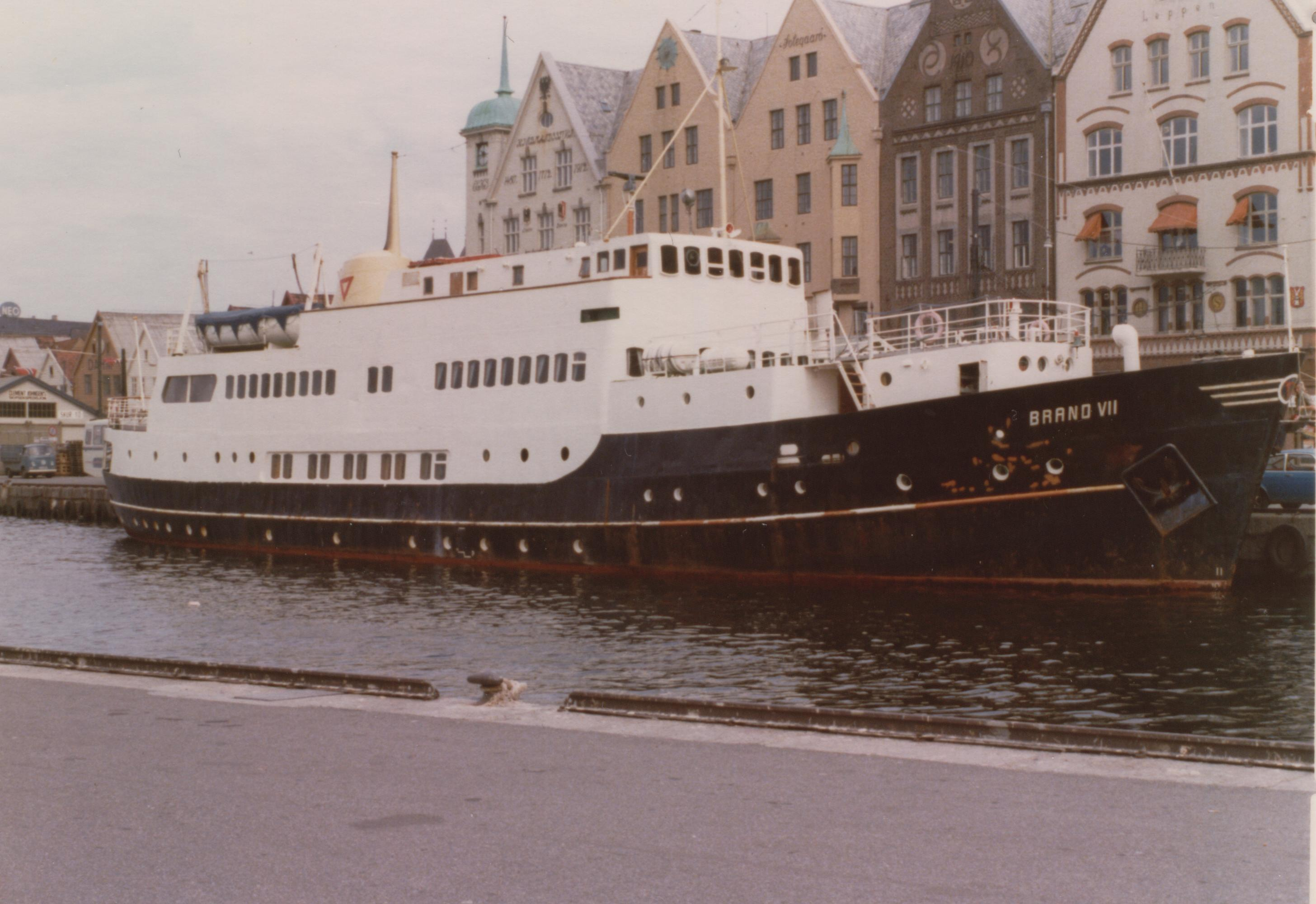 MS Kvinnherad as MS Brand in Bergen, Norway 1976.